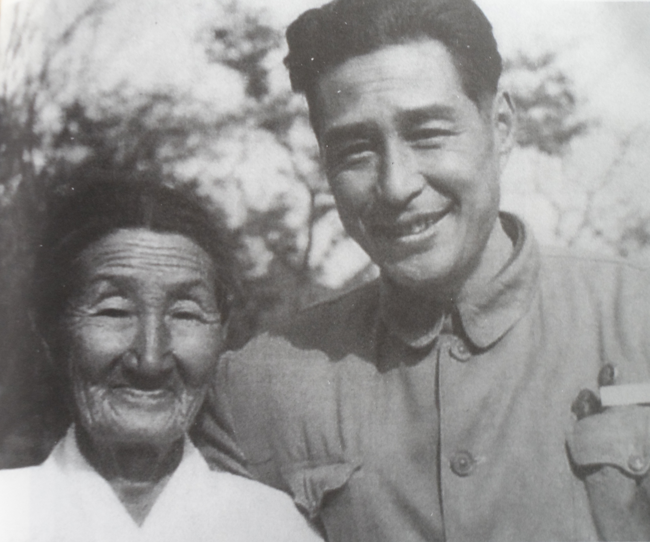 金焰和他的母亲（1952年朝鲜）